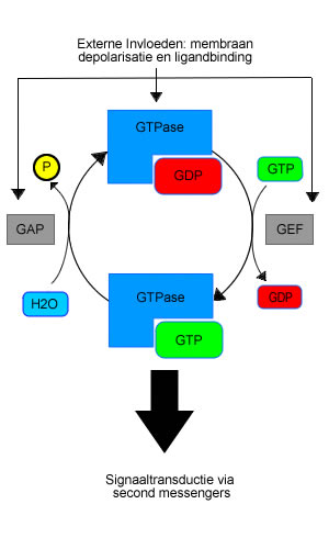 Zelfgemaakt schema